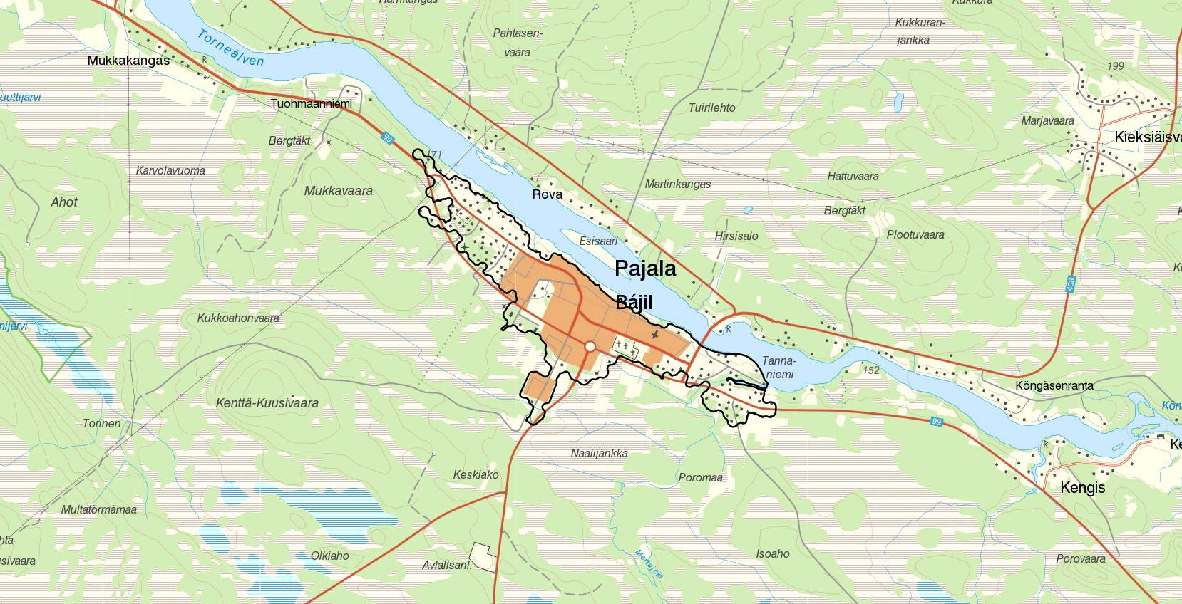 Tätorten Pajala med gränserna från Statistiska centralbyråns tätortsavgränsning 2015. Bakgrundskarta från Lantmäteriet, skala 1:30 236.